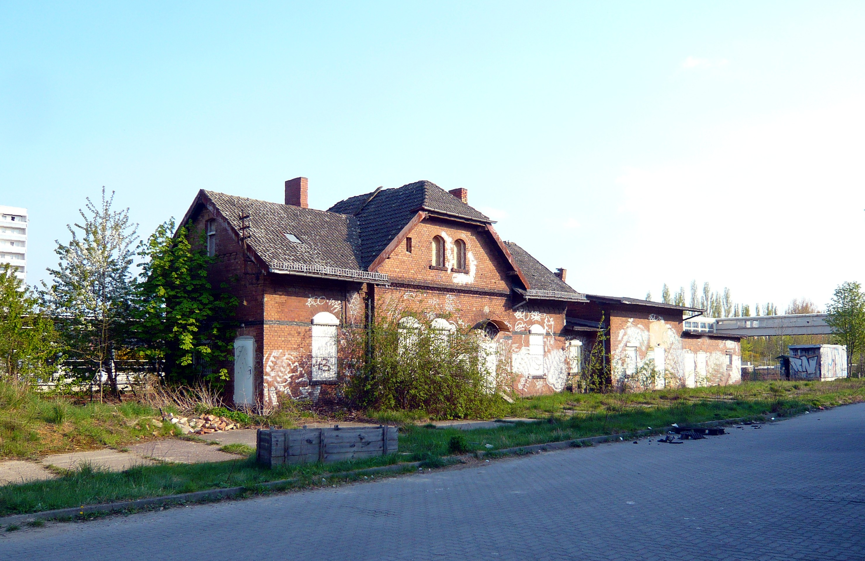 Ortsteil Berlin-Marzahn: Ahrensfelder Chaussee. Historisches Bahnhofsgebäude, leerstehend